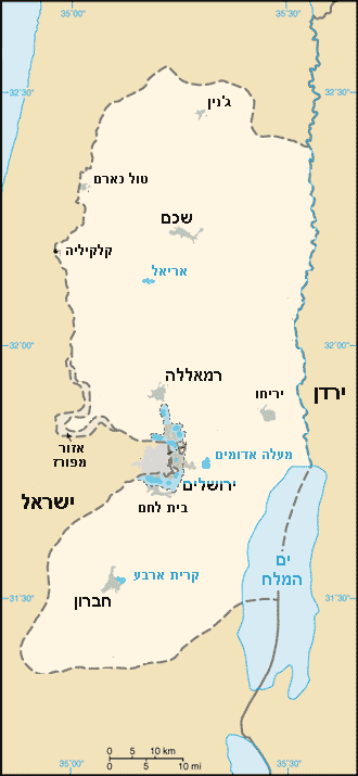 מפת he:הגדה המערבית: מבוסס על Image:We-map.png עם תוספות בעיקר על סמך [1]